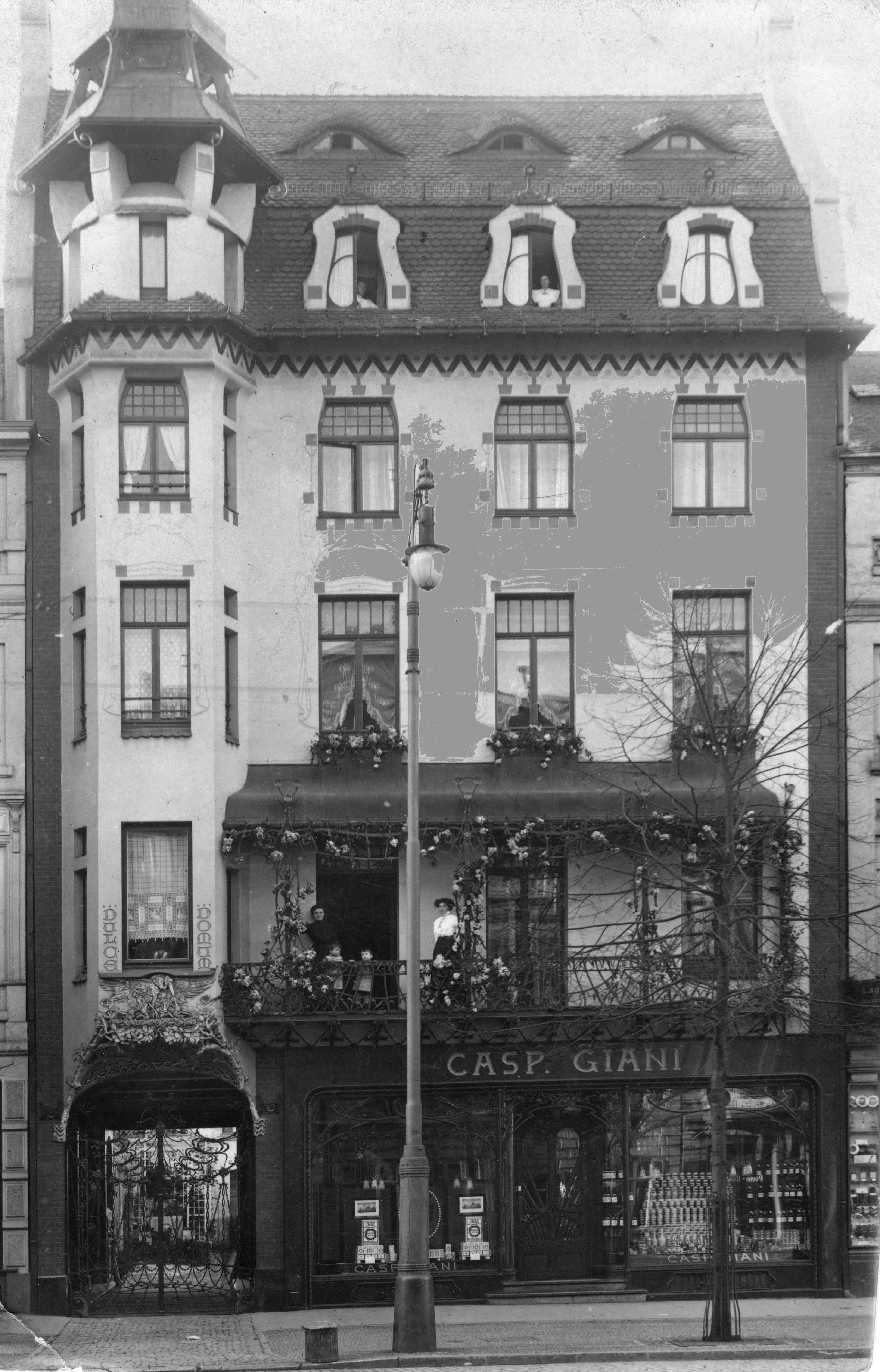 Großhandelsgeschäft für Kolonialwaren und Südfrüchte und Kaffeerösterei des Caspar Giani in der Theaterstraße 50, Aachen, Deutschland